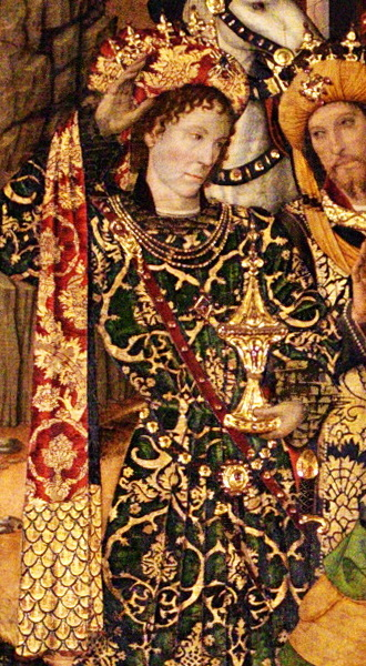 Capella Reial de Santa Àgata (Barcelona). Retaule del Conestable, obra de Jaume Huguet (1464-1465). Tremp sobre taula (673 x 368 cm)